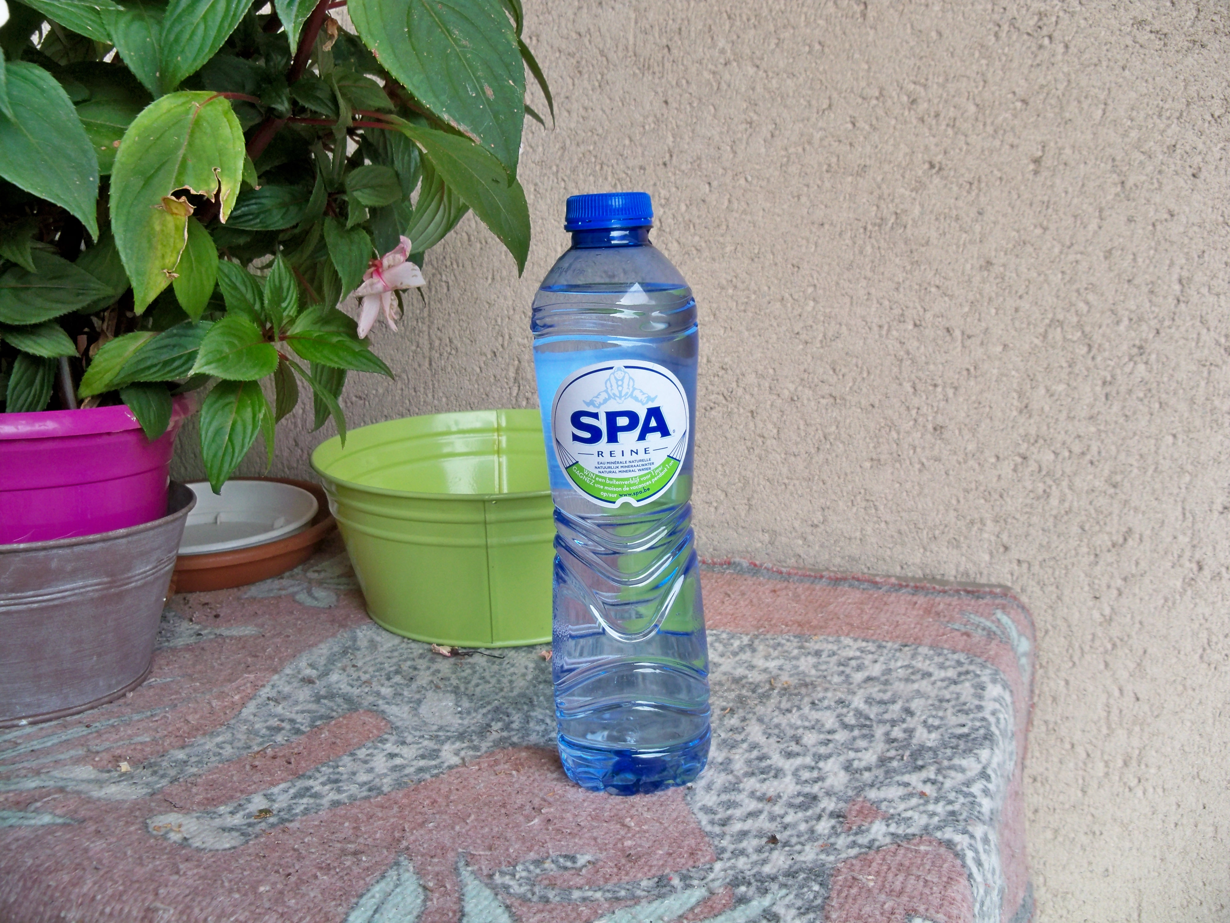 bouteille d'eau de Spa